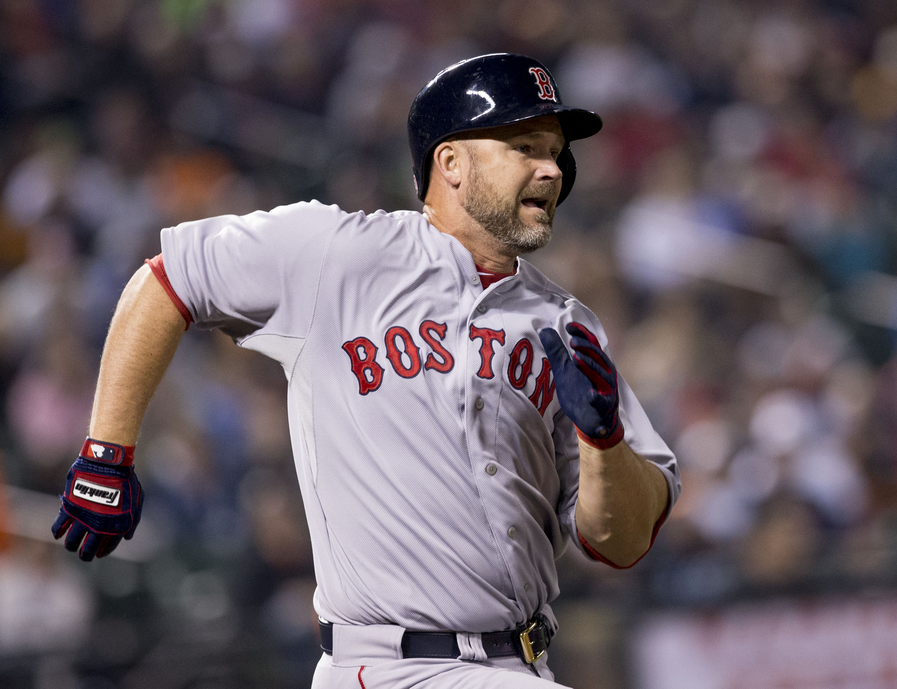 David Ross